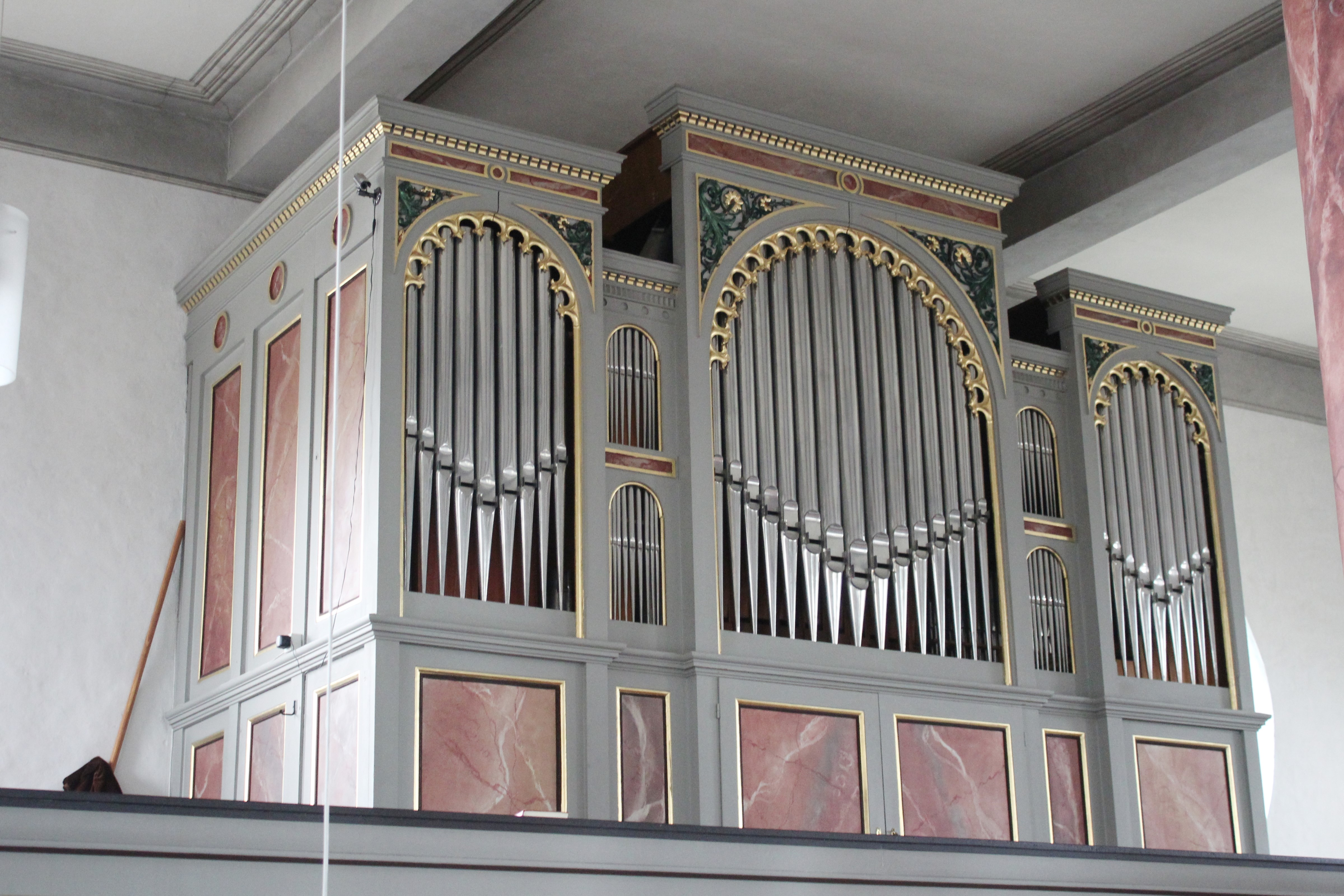 Ev. Kirche Schwalbach, Schöffengrund, Lahn-Dill-Kreis, Hessen, Deutschland